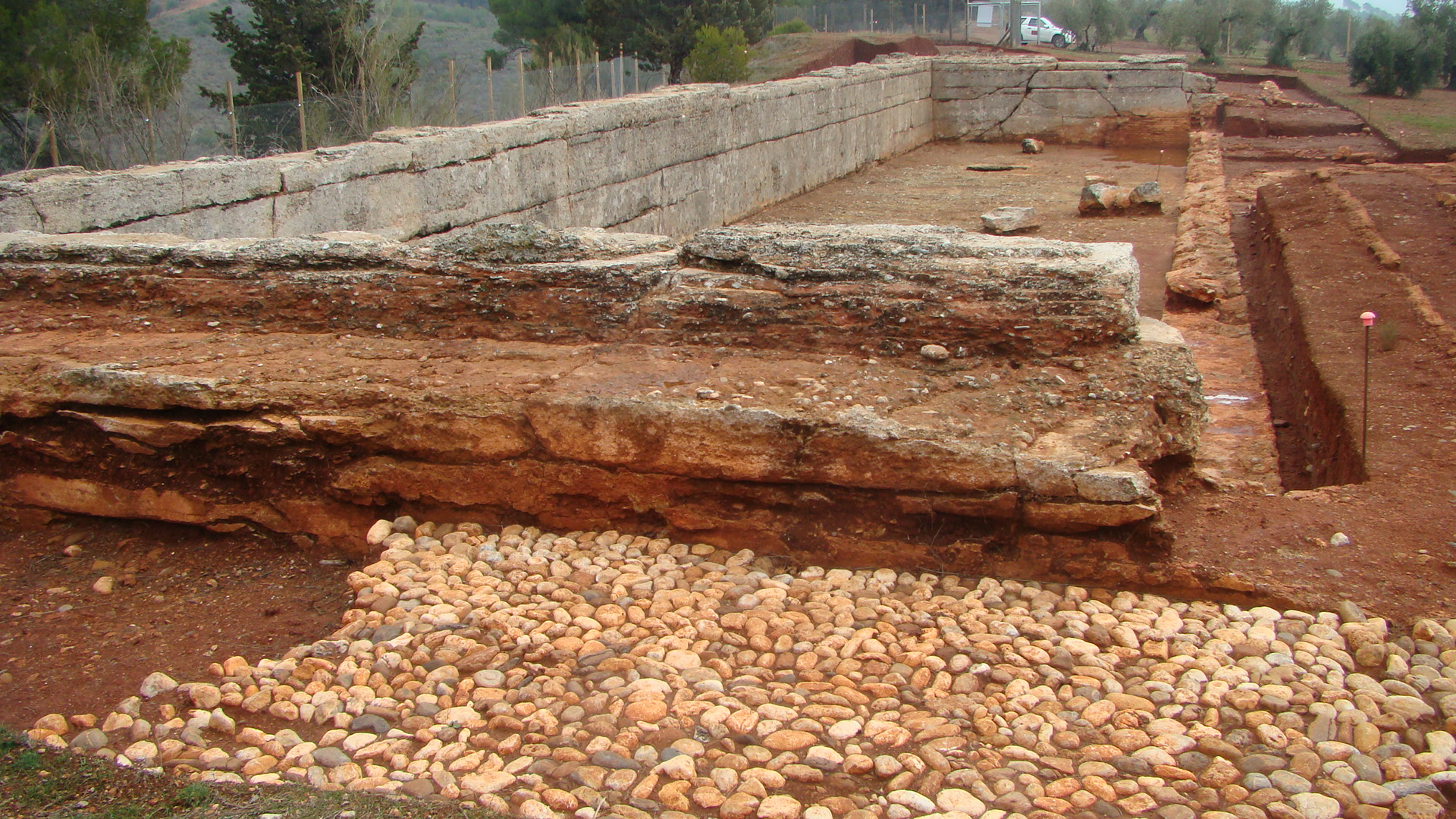 Vista general del complejo de los Pozos Altos, con la Alberca Rota